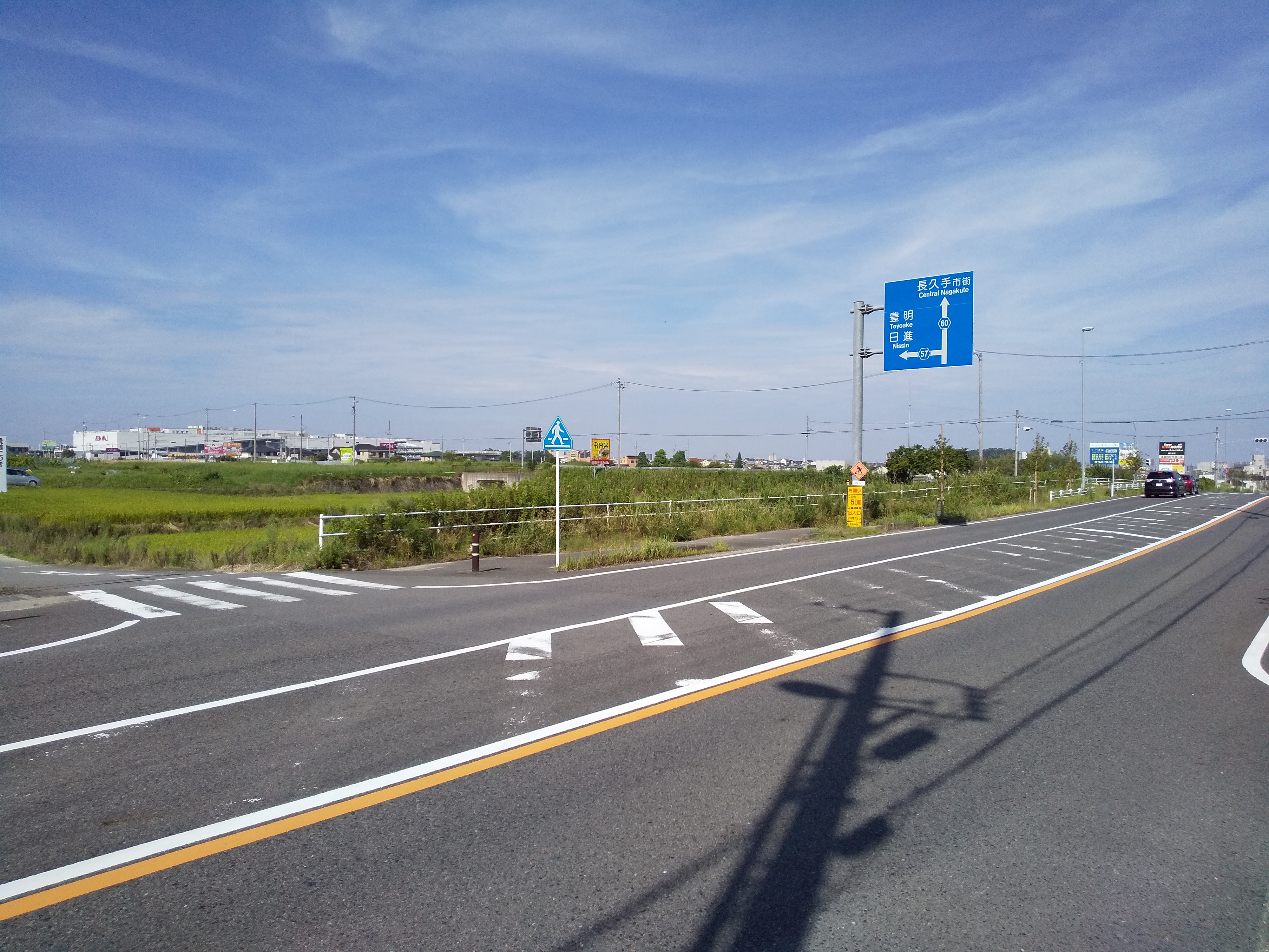 愛知県道60号と愛知県道57号が交わる交差点。市街化調整区域内にあり、比較的家が少ない。